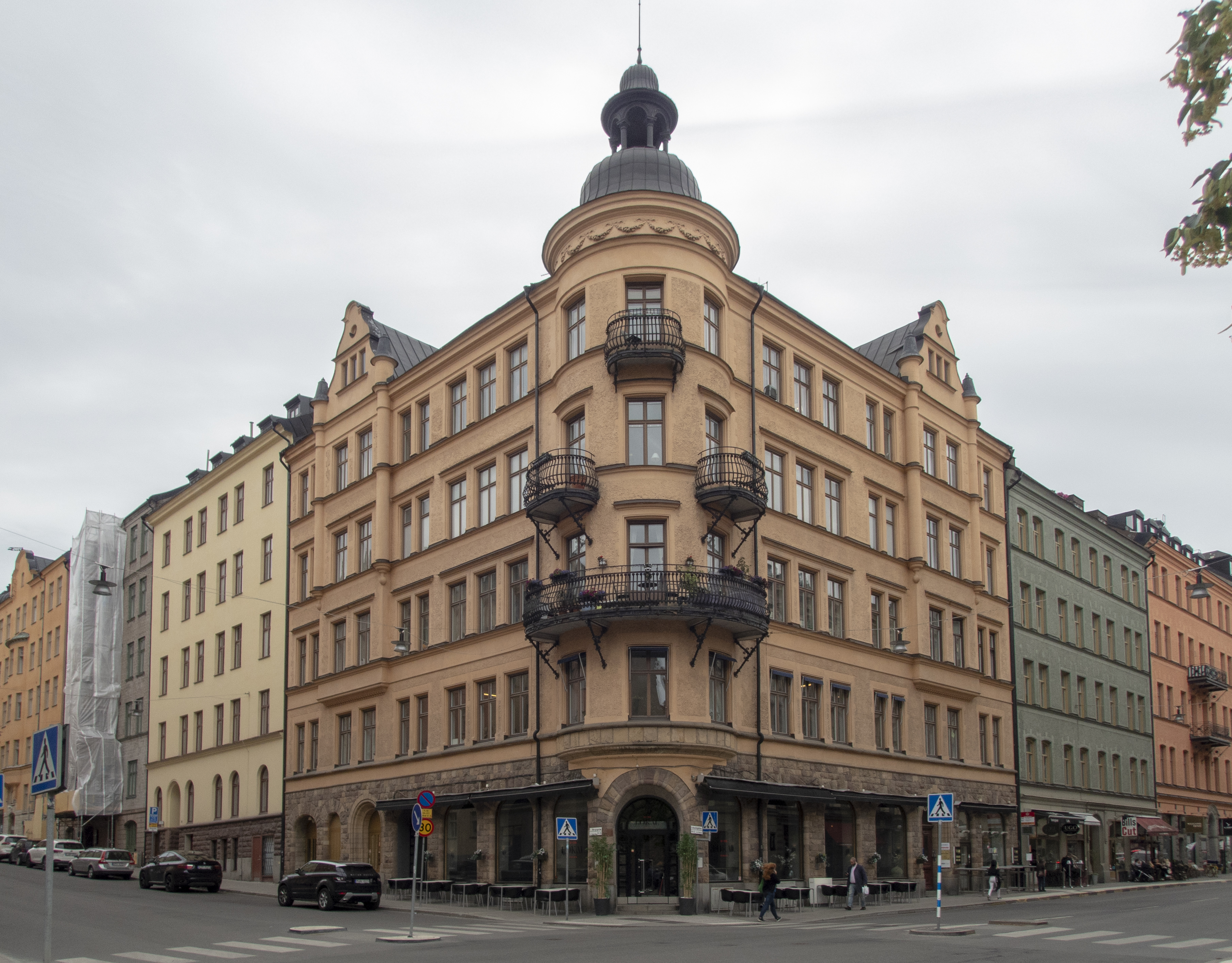 Vindruvan 14, Bergsgatan 15, Scheelegatan 8 Stockholm Nybyggnadsår 1899 - 1900 Carl Erik Lindewall (Byggmästare) C. A. Strömberg (Byggherre) Gustaf E. Pettersson (Byggmästare) J. A. Johansson (Byggherre) Nils L. Lundberg (Byggmästare) P. J. Lindblad (Arkitekt)